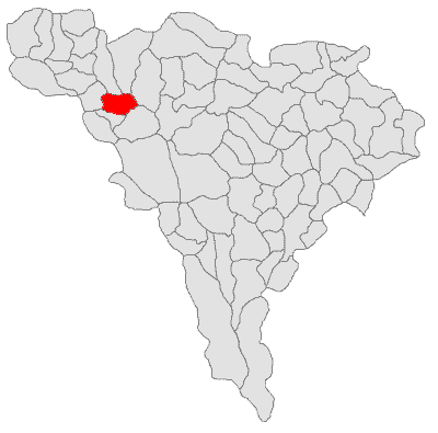 Categorie:Hărţi ale judeţului Alba